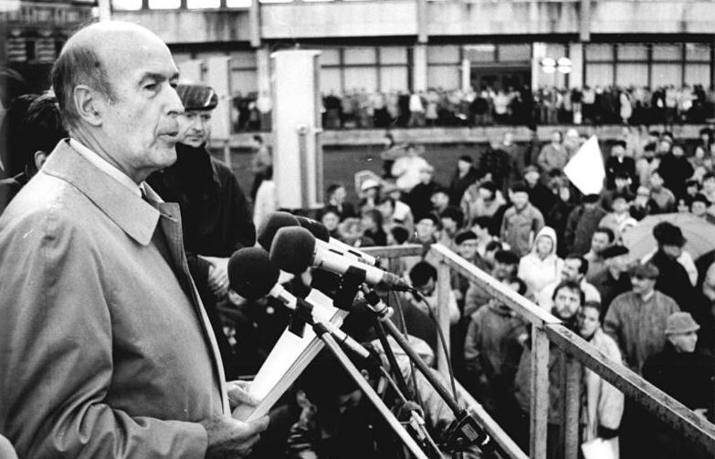 ADN-ZB Häßler 9.3.1990 Le Dresden: Wahlkampf. Auf einer Wahlkampfveranstaltung des Bundes Freier Demokraten in der Elbestadt sprach der Vorsitzende der liberalen und demokratischen Fraktion im Europäischen Parlament, Valery Giscard d'Estaing, zu mehreren hundert Teilnehmern.